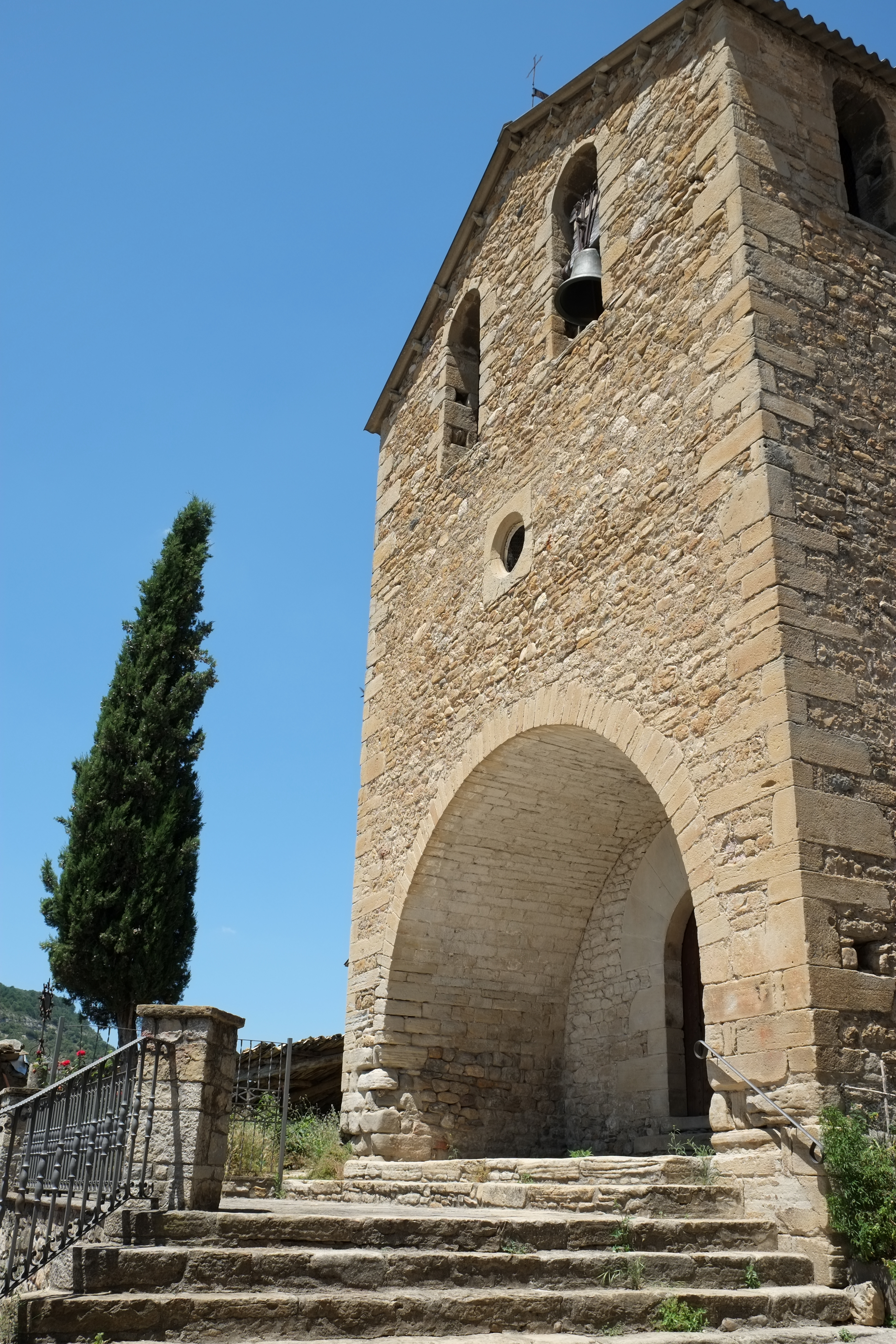 Kirche in La Puebla de Roda in Aragonien (Spanien)